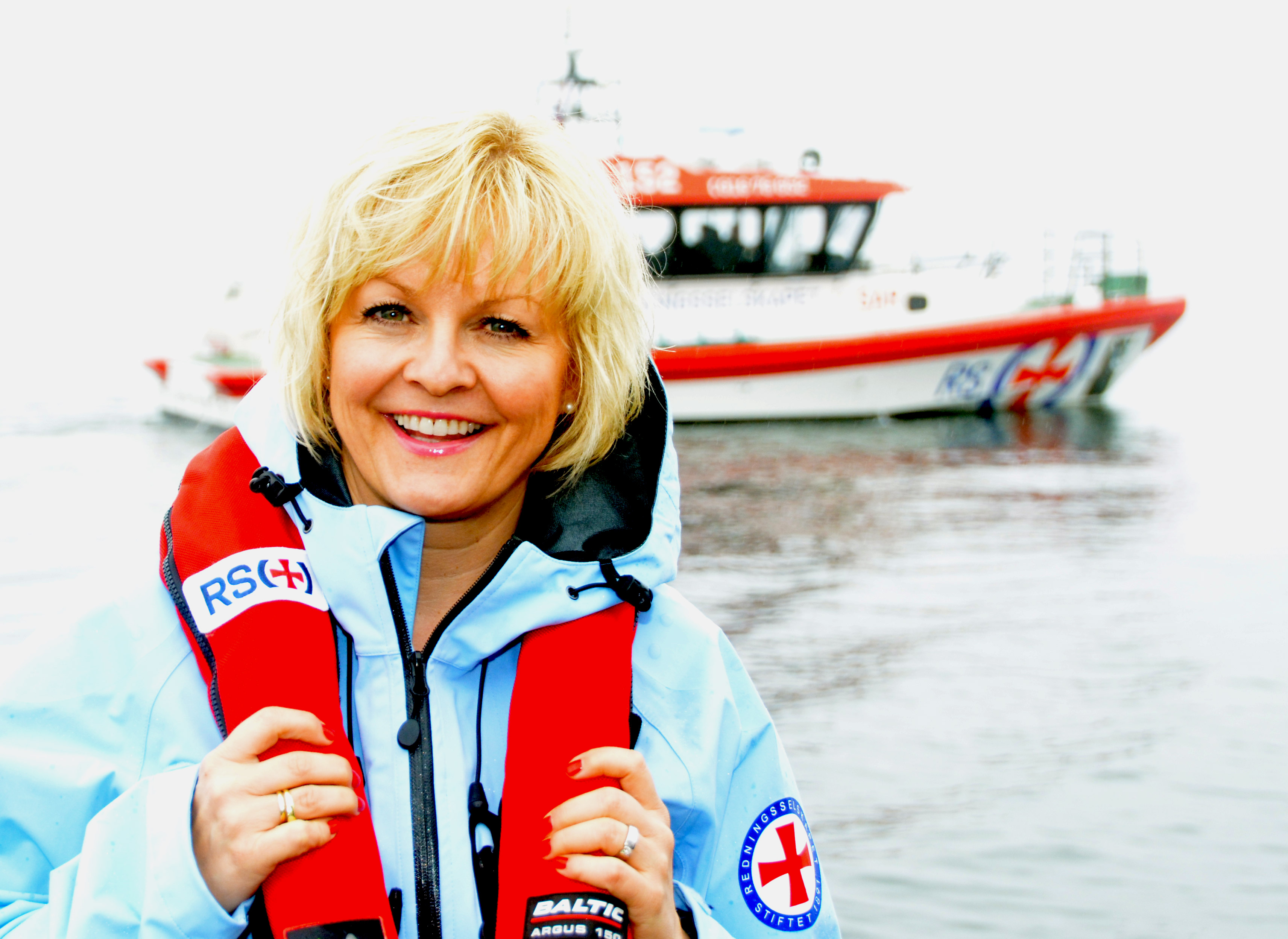 Generalsekretær i Redningsselskapet, redningsvest